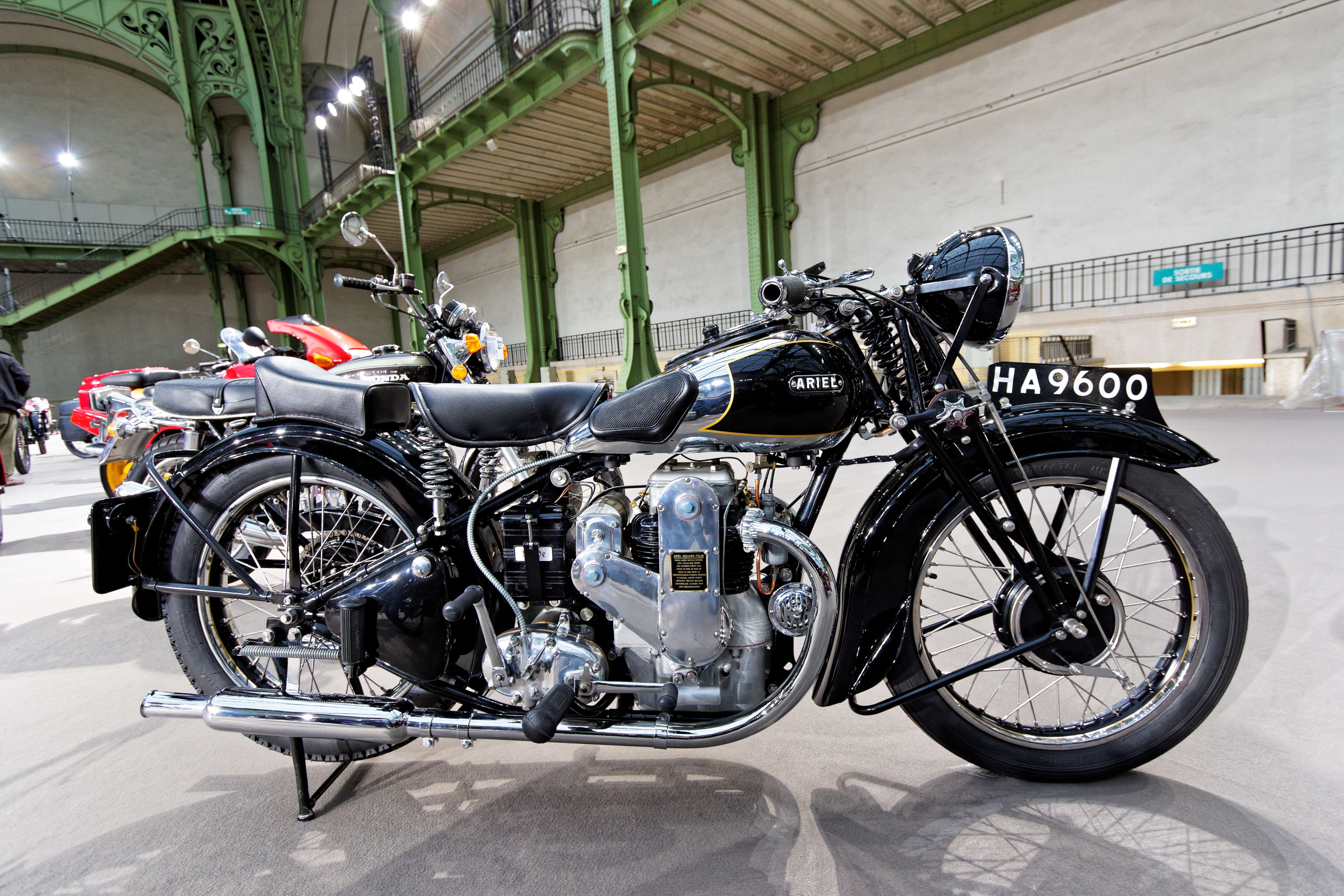 Un des véhicules présenté lors de la vente aux enchères Bonhams 2016 au Grand Palais de Paris.